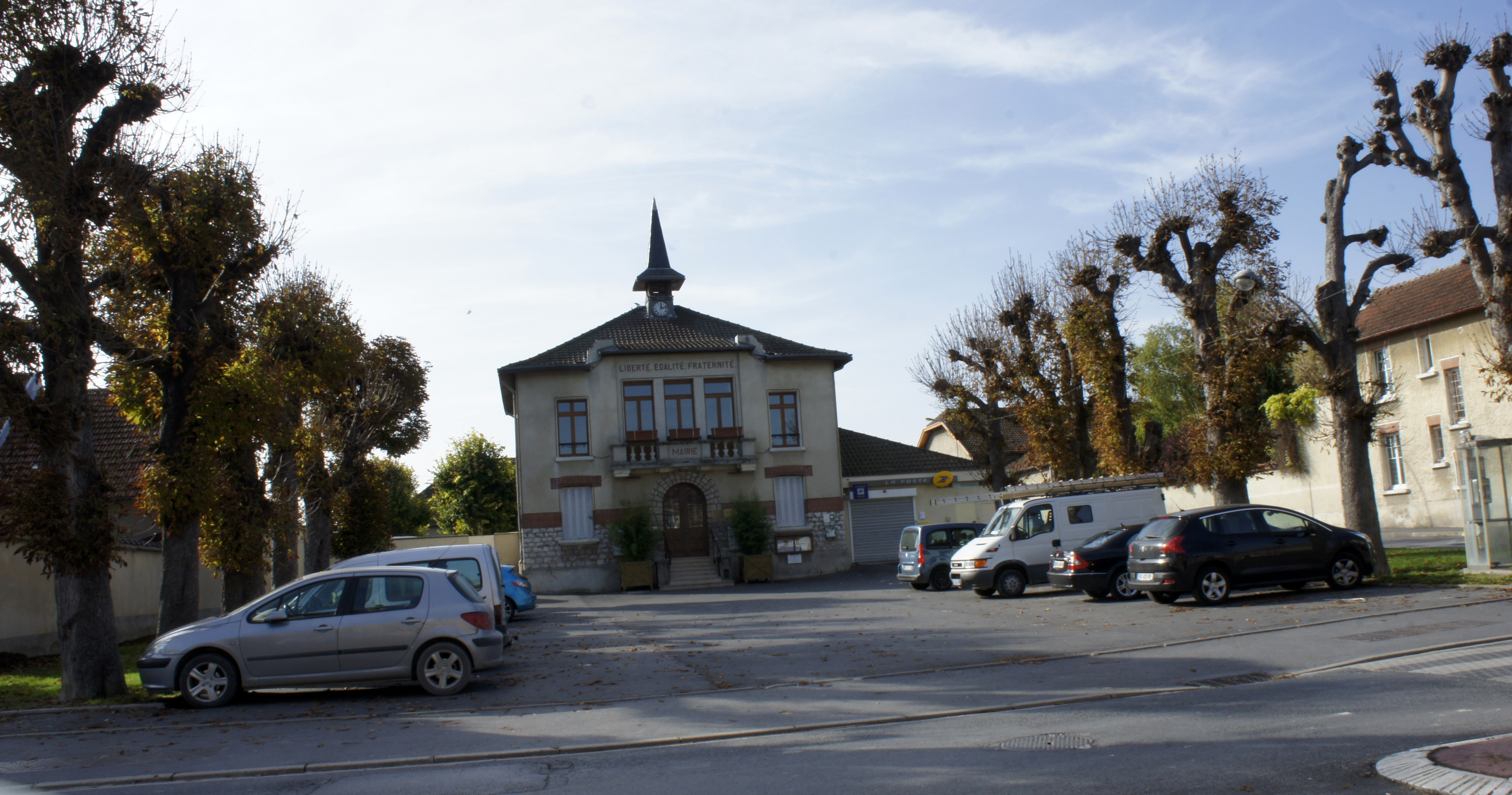 Vue de la Mairie_de Taissy.